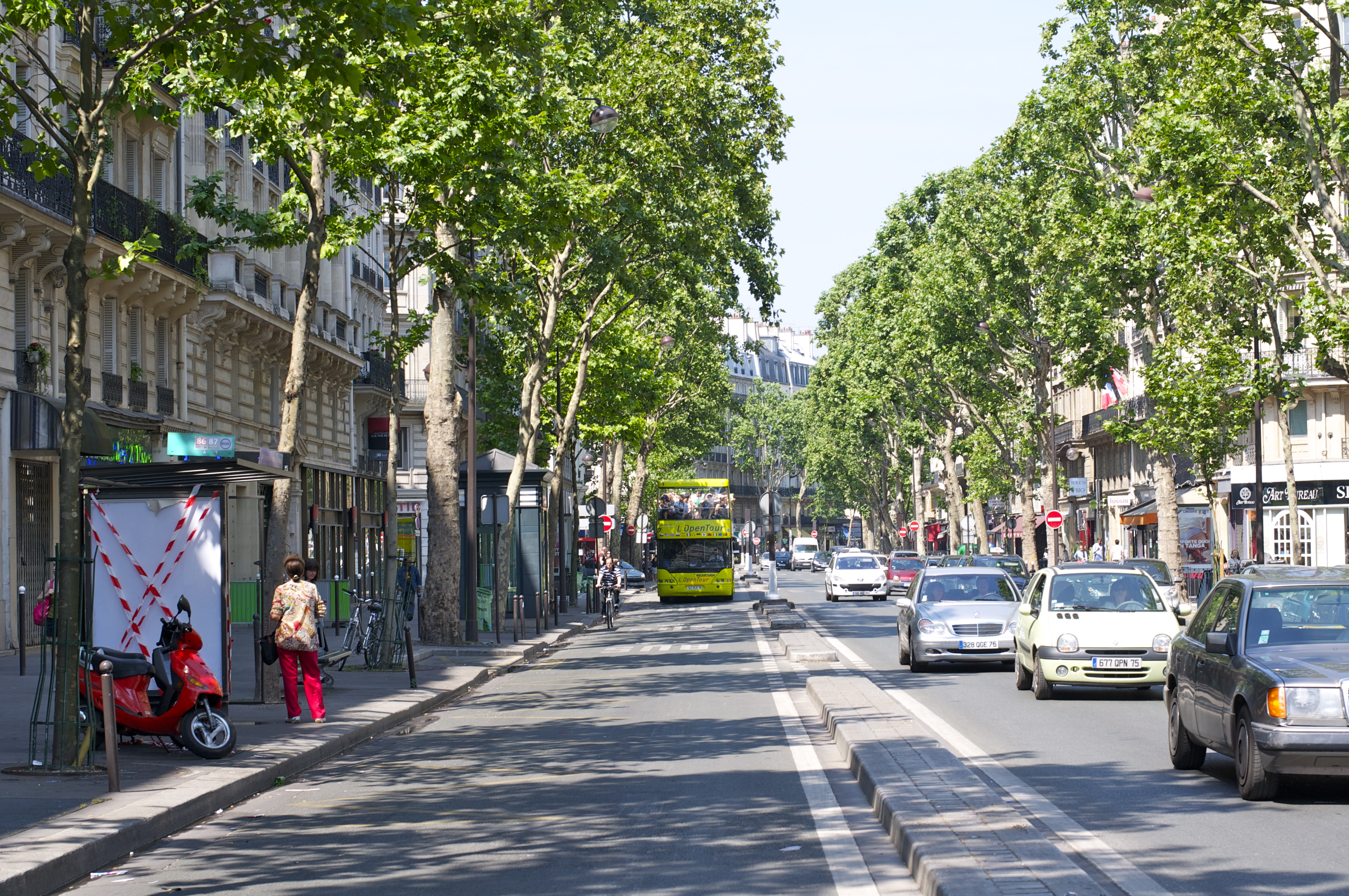 Boulevard Saint-Germain (Paris)